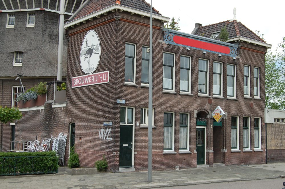 Brouwerij 't IJ Amsterdam, Netherlands